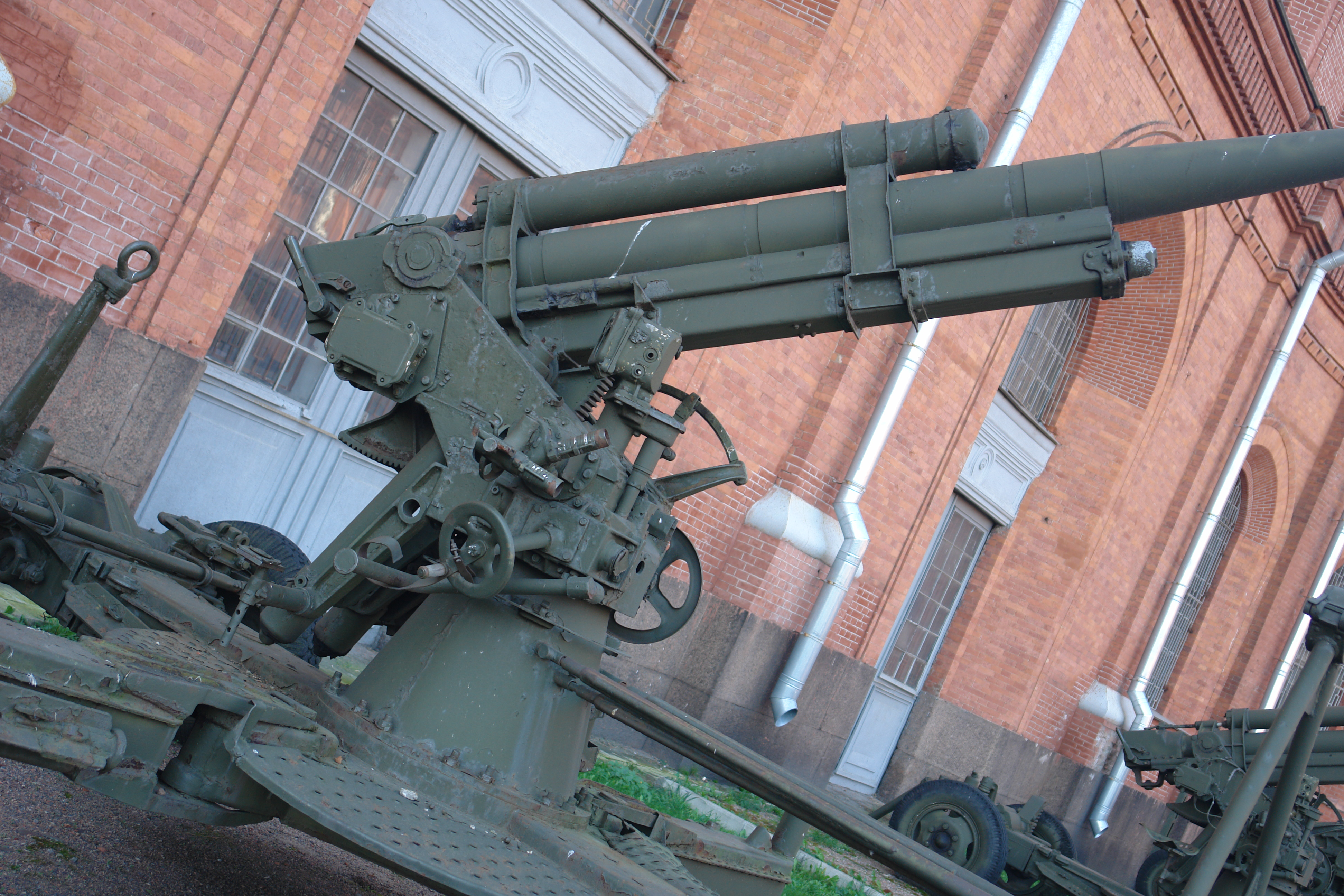 85-мм зенитная пушка обр. 1939 г Главный конструктор М.Н. Логинов. Досягаемость стрельбы, м: по высоте - 10500, по дальности - 15500. Скорострельность - 15-20 выстр/мин. Масса, кг: орудия - 4900, снаряда - 9,2. Расчет - 7 человек. Военно-исторический музей артиллерии, инженерных войск и войск связи, Санкт-Петербург.